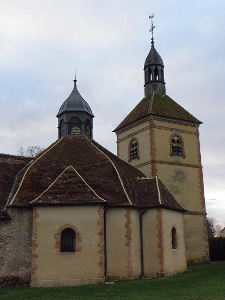 Église Saint-Hubert de la commune de Les Marêts (77).